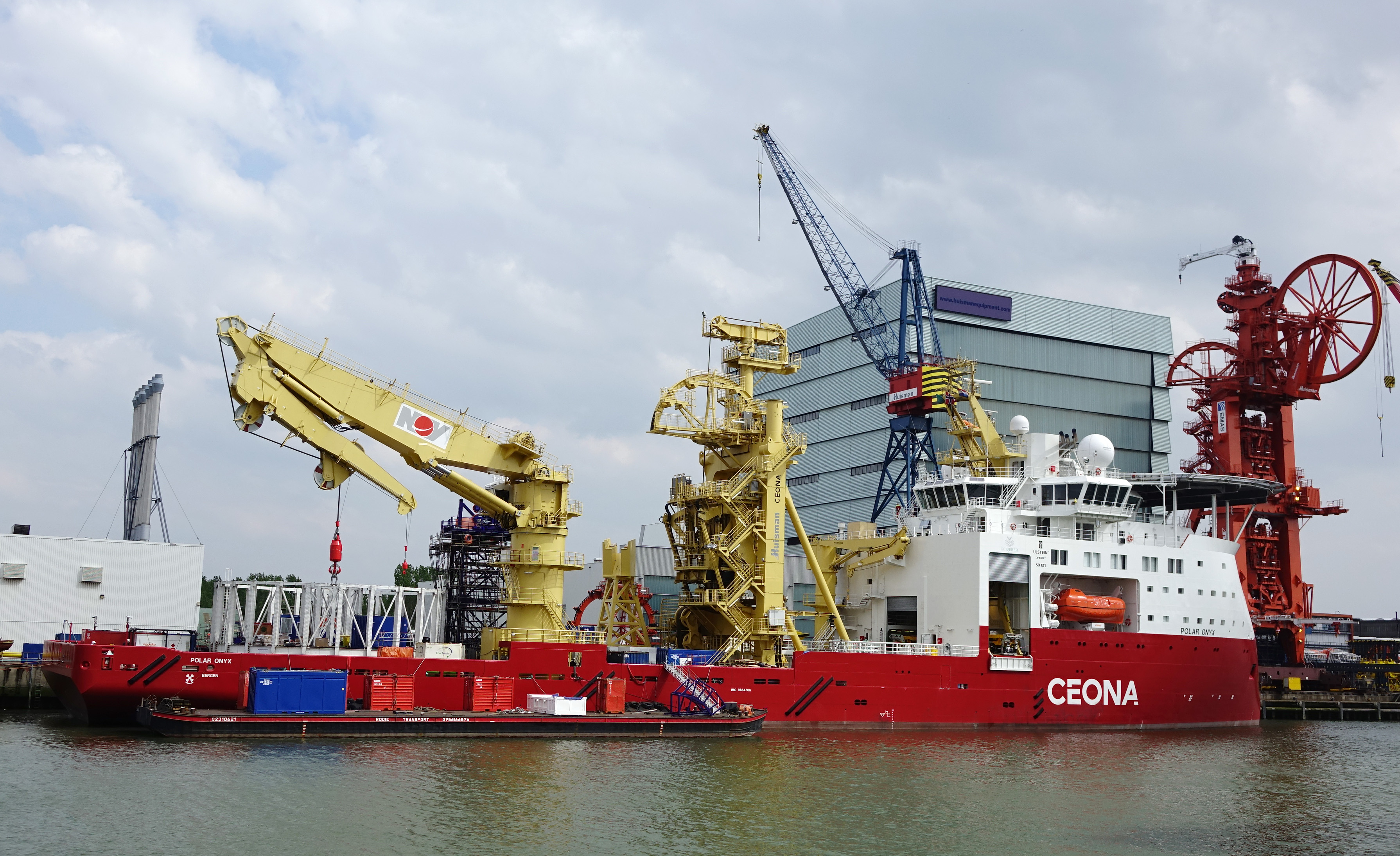 Wiltonhaven Schiedam 20-4-2014